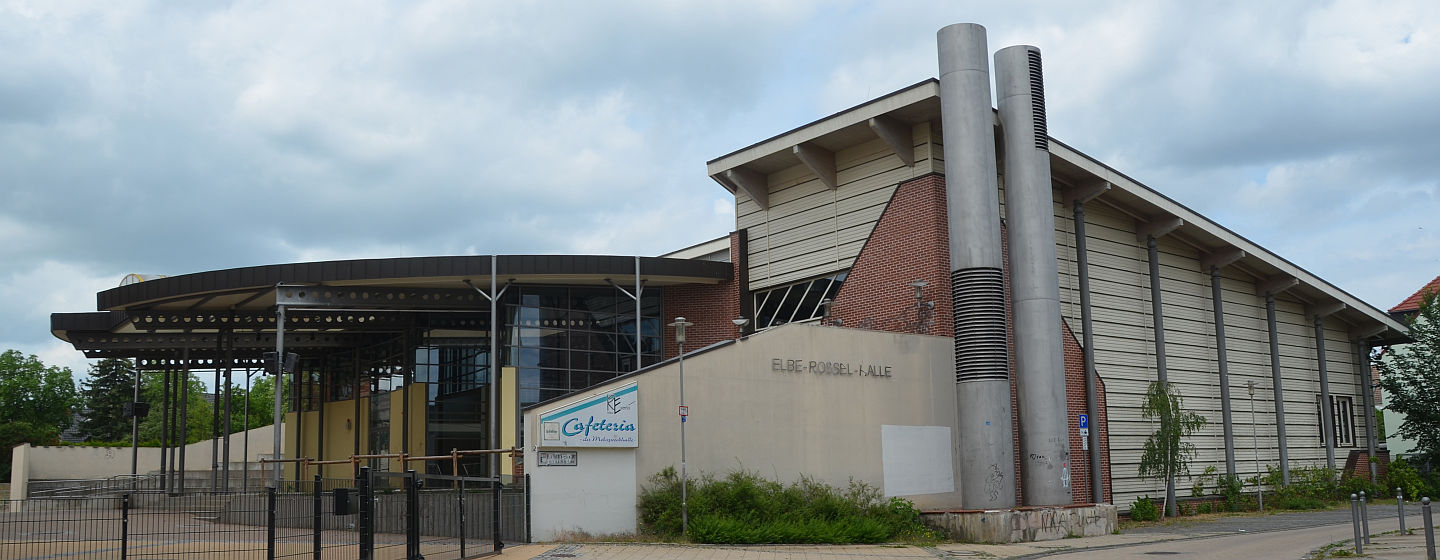 Elbe-Rossel-Halle in Roßlau